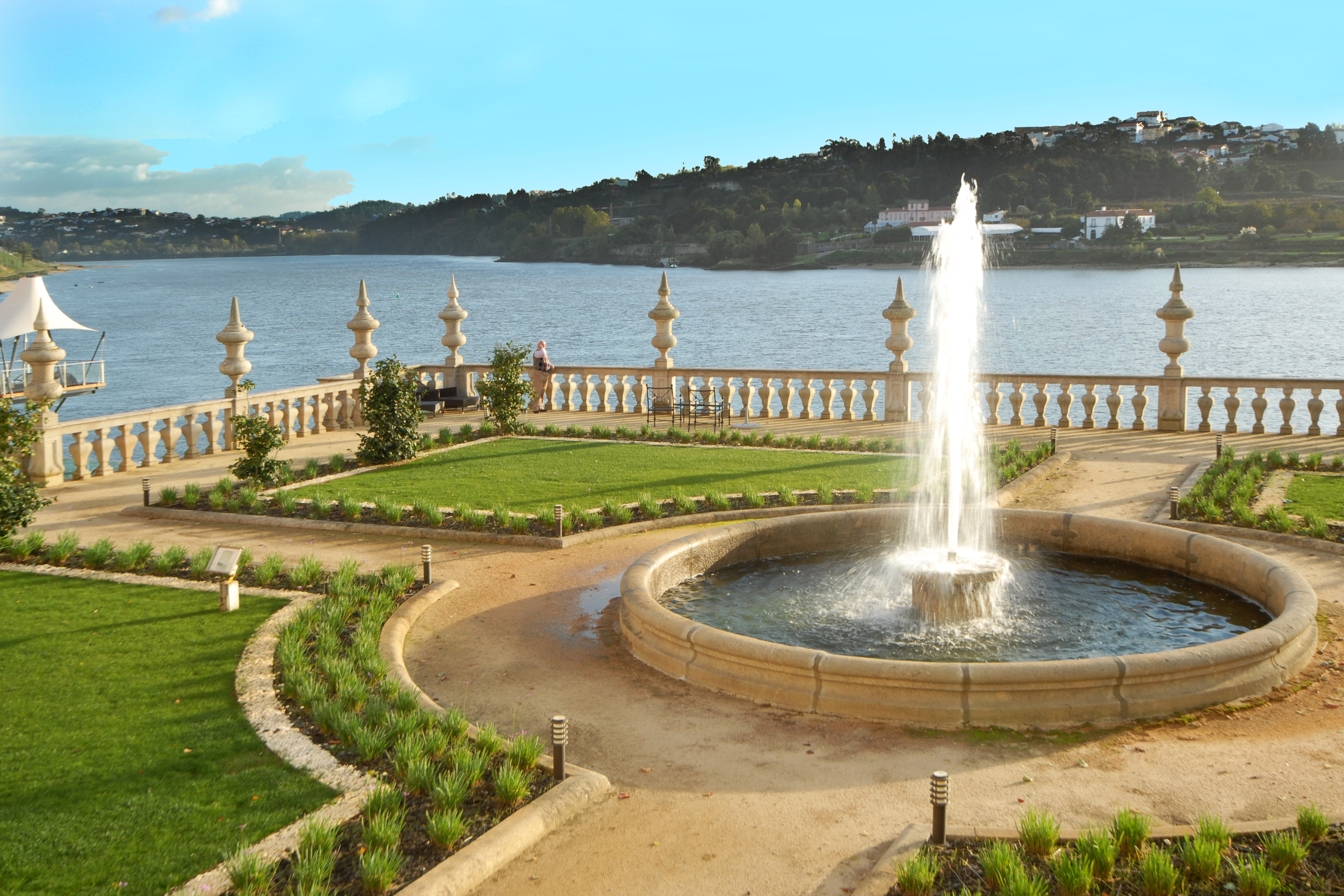 Pousada do Palácio do Freixo This file was uploaded for Wiki Loves Monuments in Portugal with the unique identifier 70403.